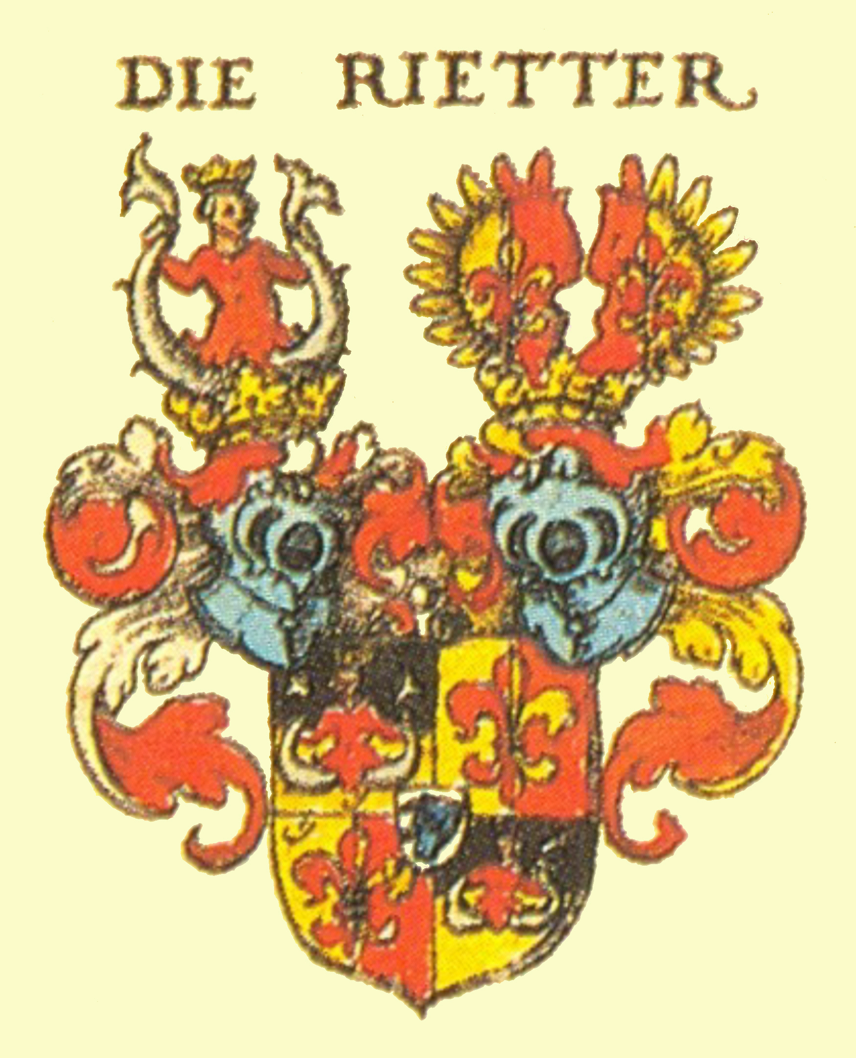 Wappen der Nürnberger Patrizierfamilie Rieter von Kornburg und Kalbensteinberg und Bocksberg